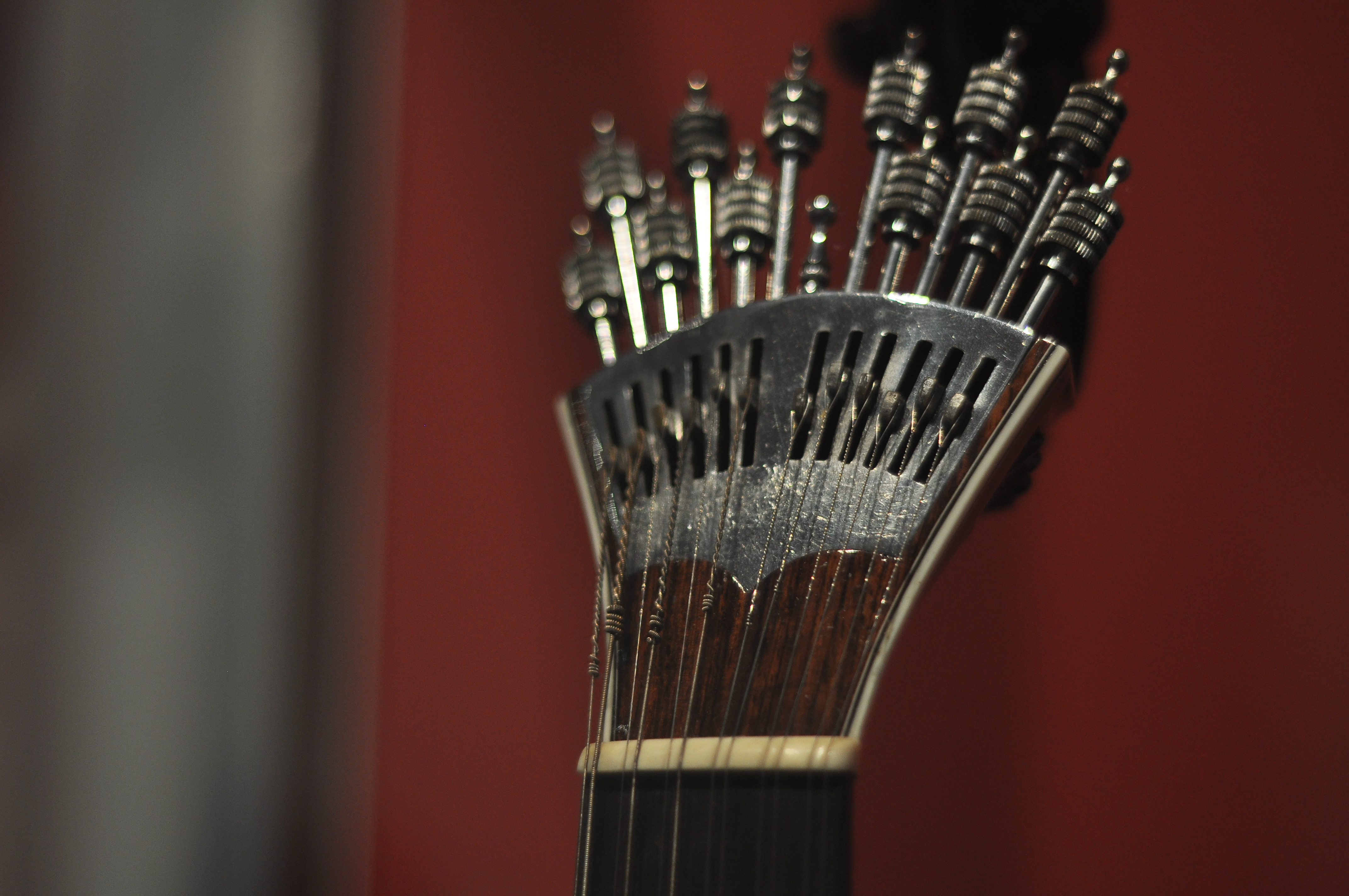 Exposição Guitarra Portuguesa, Portimão 2012